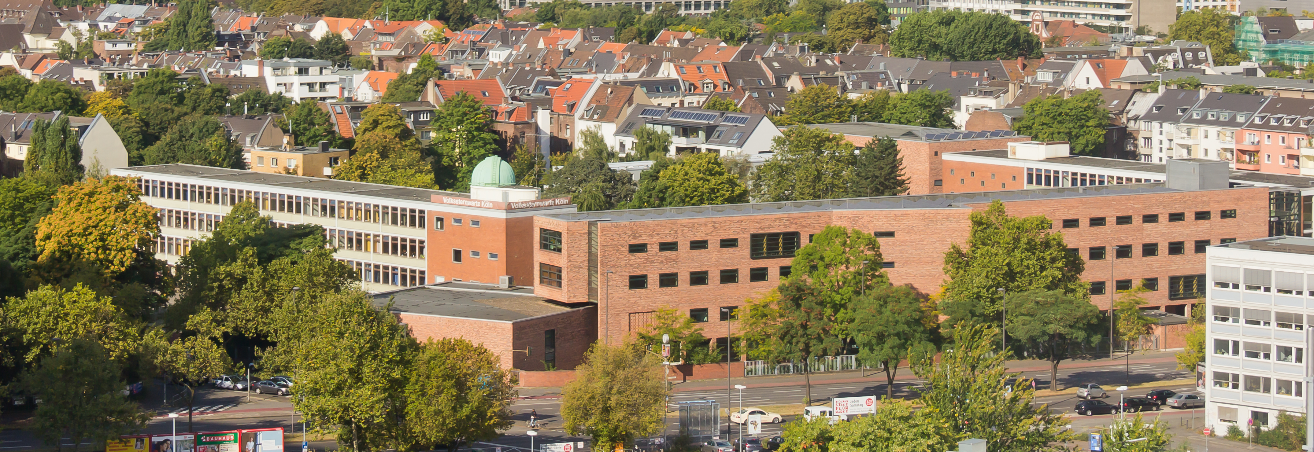 Schiller-Gymnasium Köln, Ansicht vom Hochhaus des Justizzentrums.